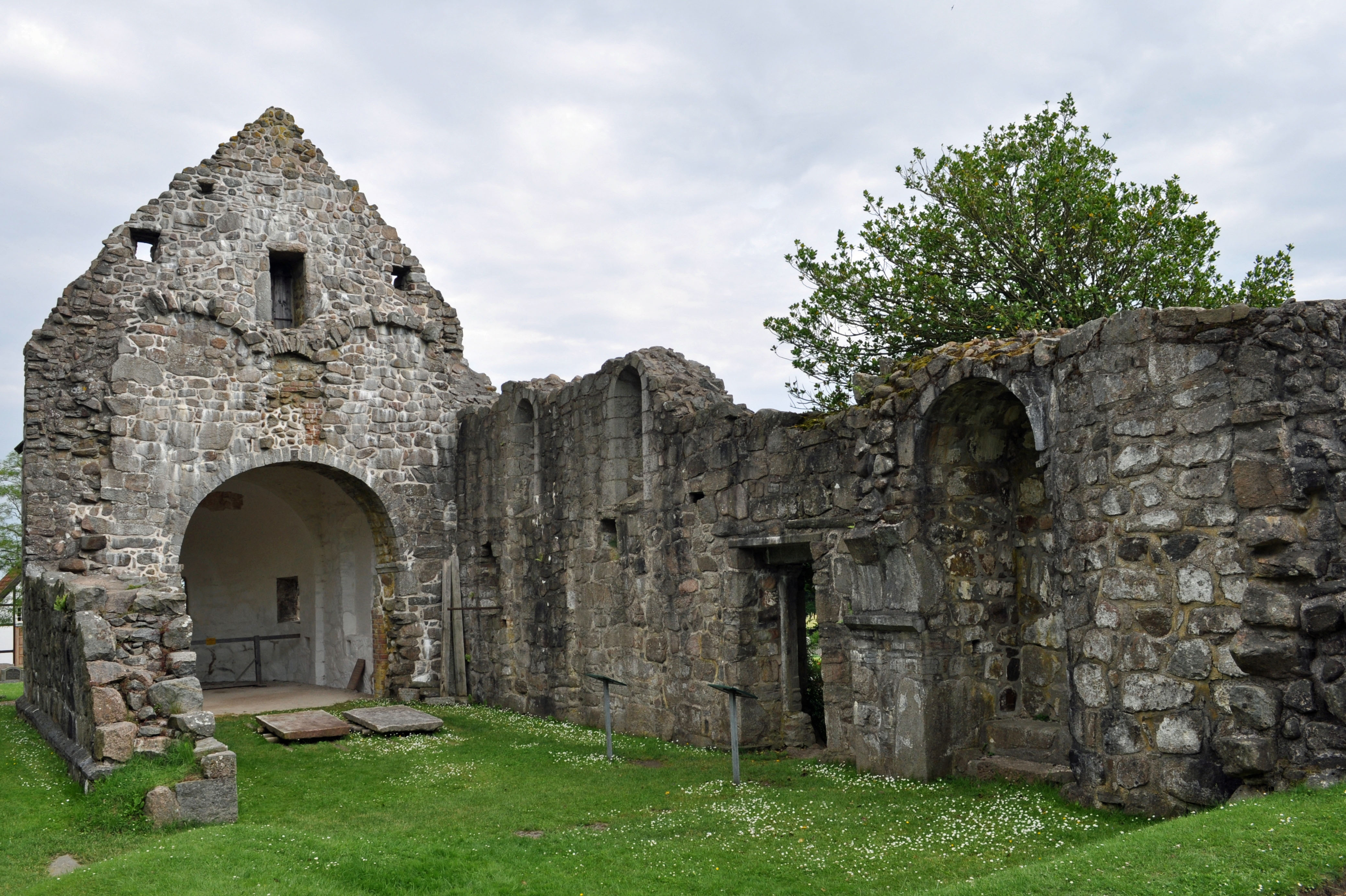 Østermarie Kirche, Bornholm (2012-07-11), by Klugschnacker in Wikipedia (5)